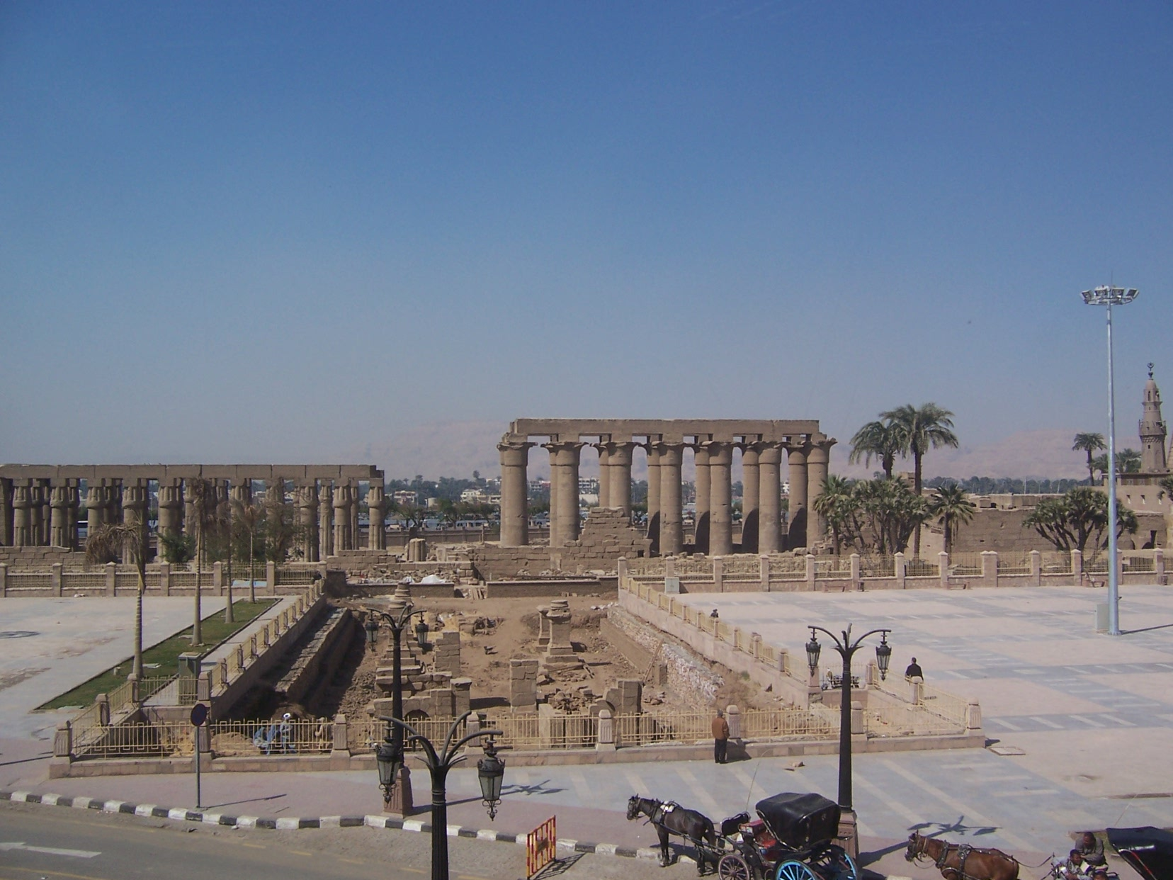 Luxor Temple at Luxor, Egypt